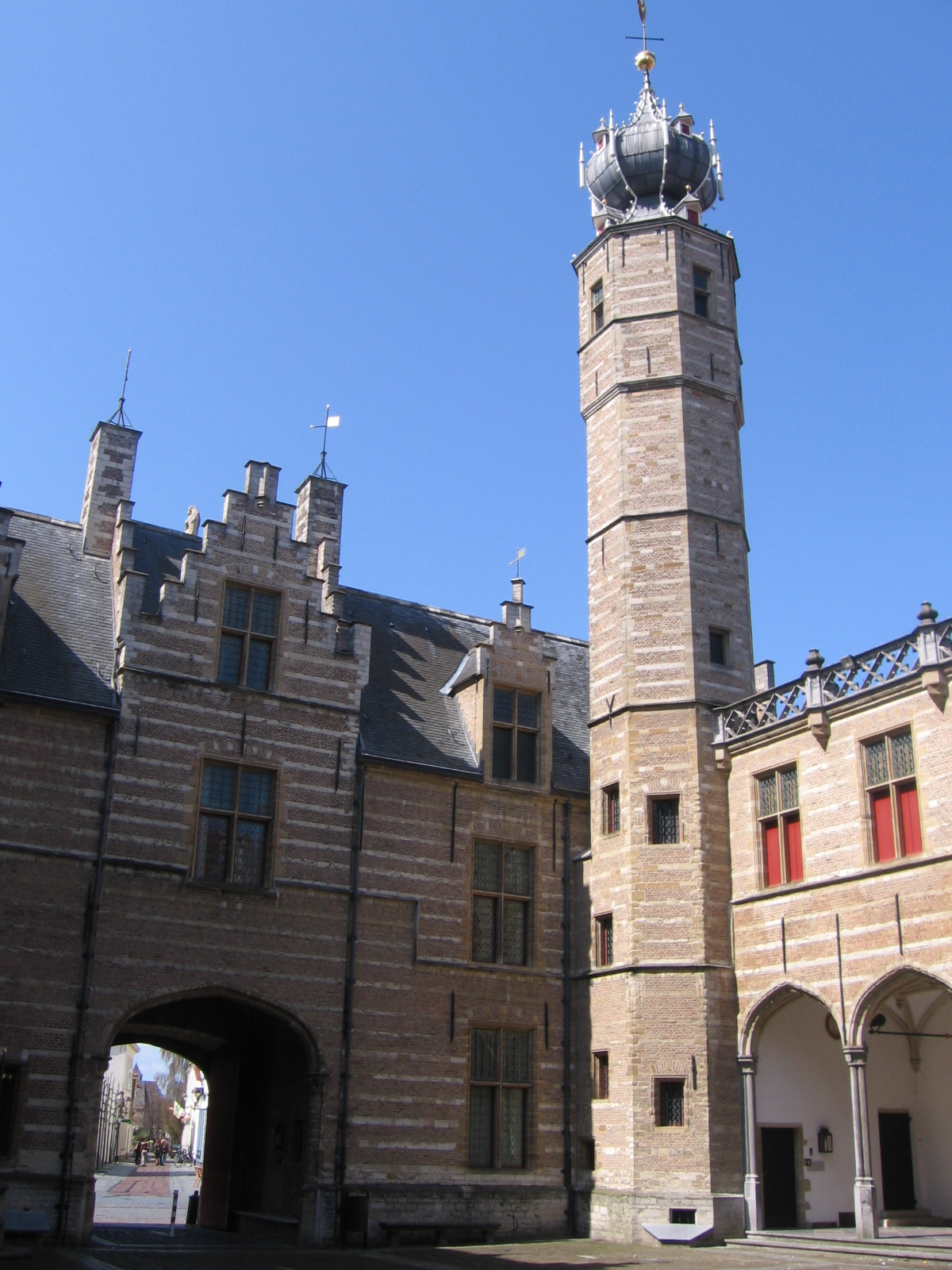 Markiezenhof in Bergen op Zoom, 17 april 2006